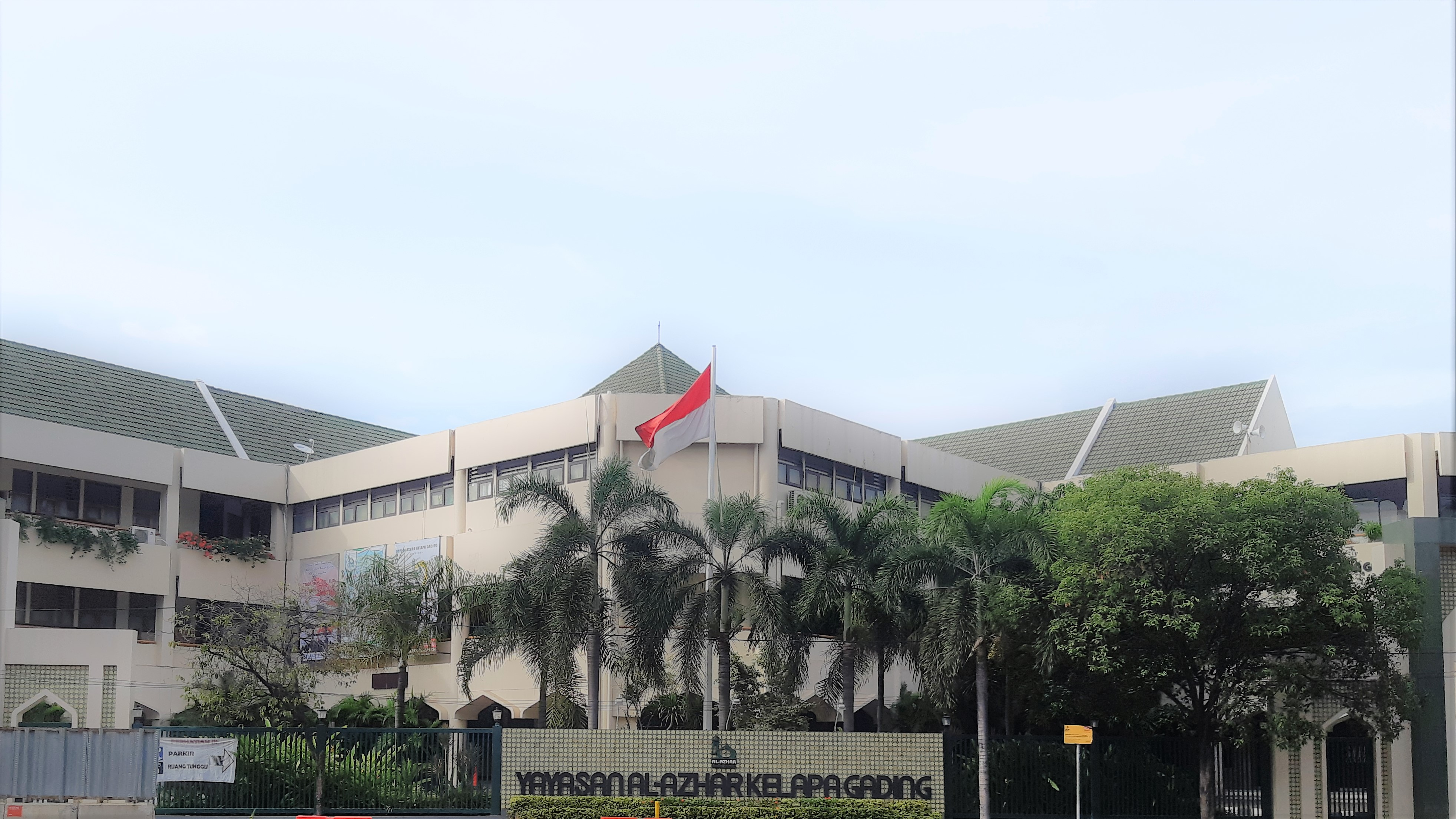 Yayasan Al Azhar Kelapa Gading